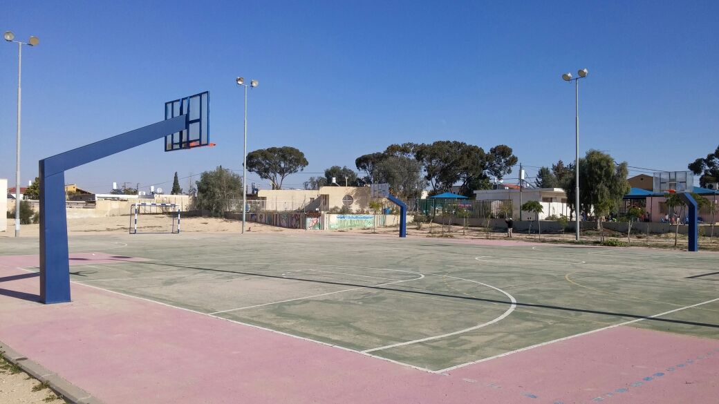 אורט ספיר ירוחם